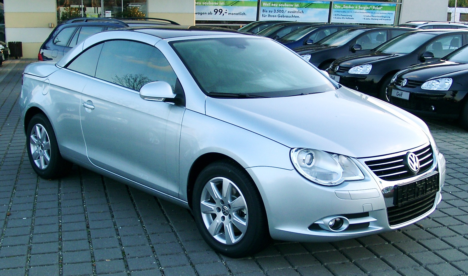 VW Eos